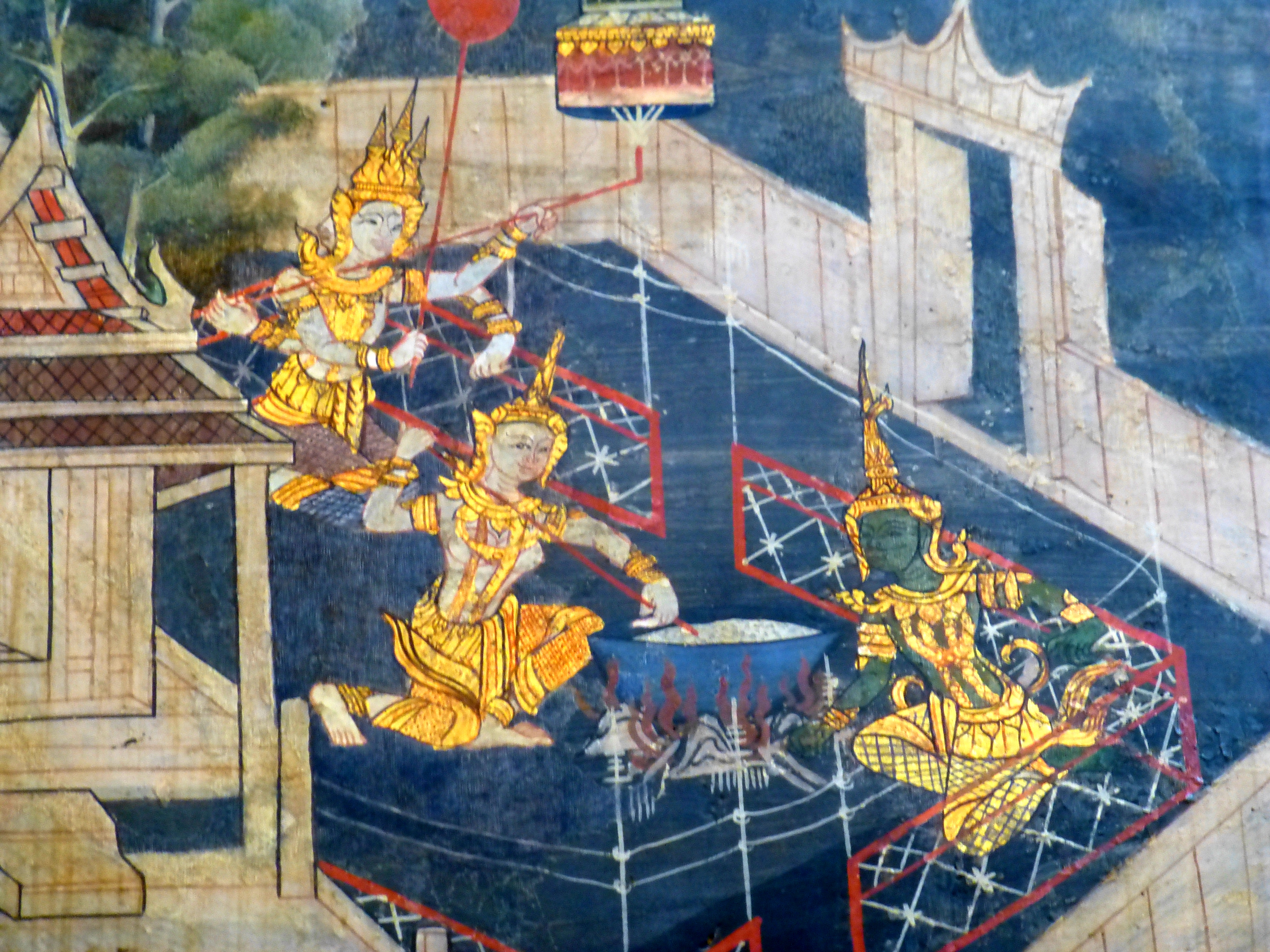 084 Sujata cooking Rice, Wat Kasattrathirat, Ayutthaya